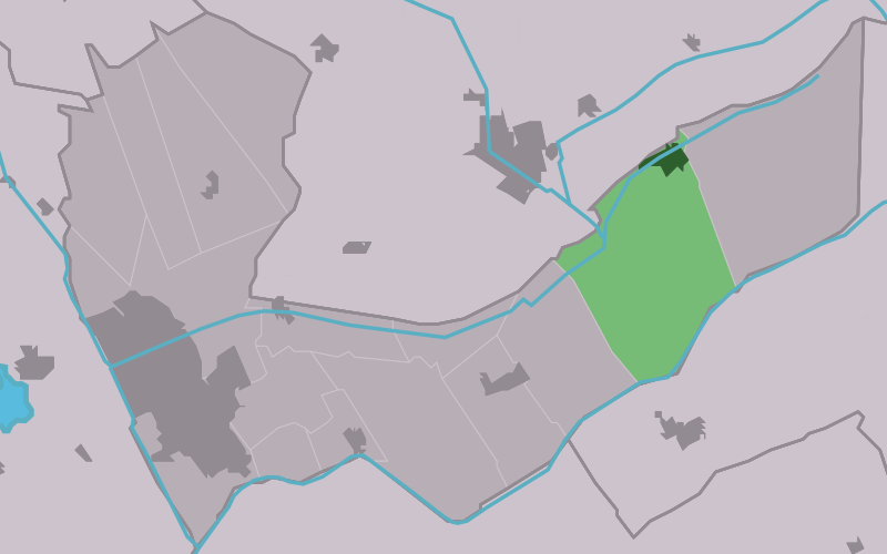 Kaartsje fan himrik fan Jobbegea